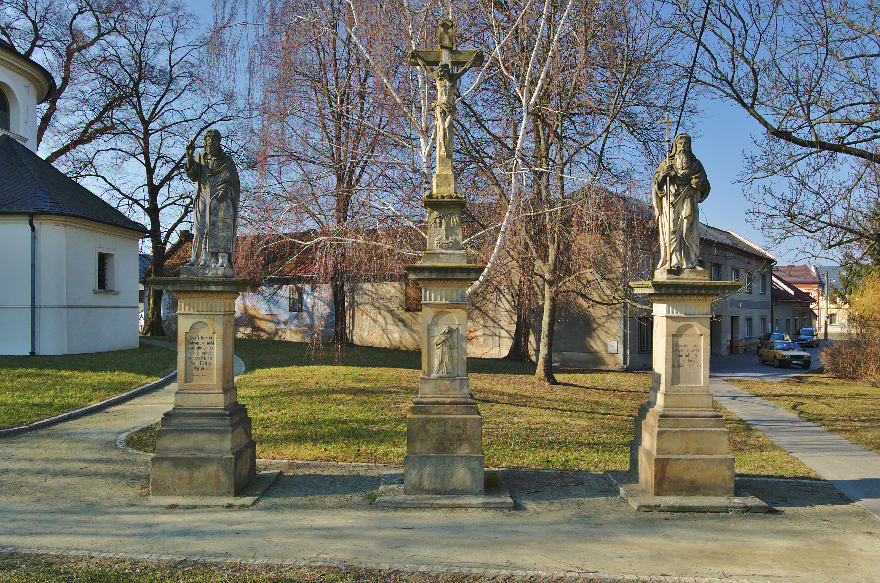 Sochy Cyrila a Metoděje a kříž na návsi, Olšany, okres Prostějov